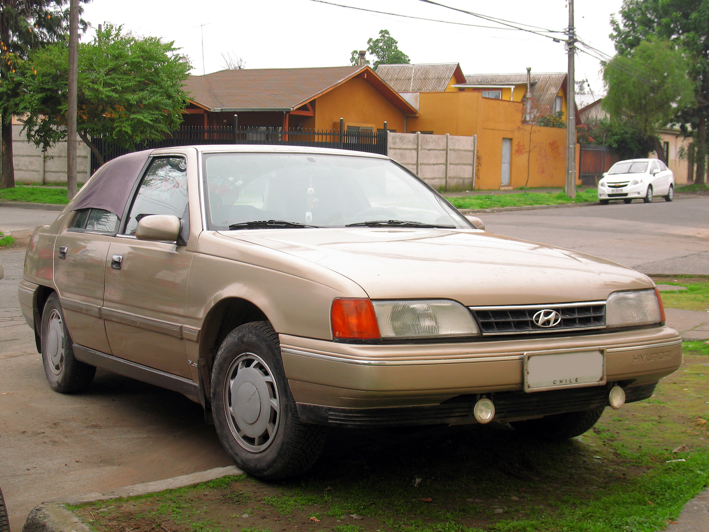 Hyundai Sonata 2.0 GLS 1989